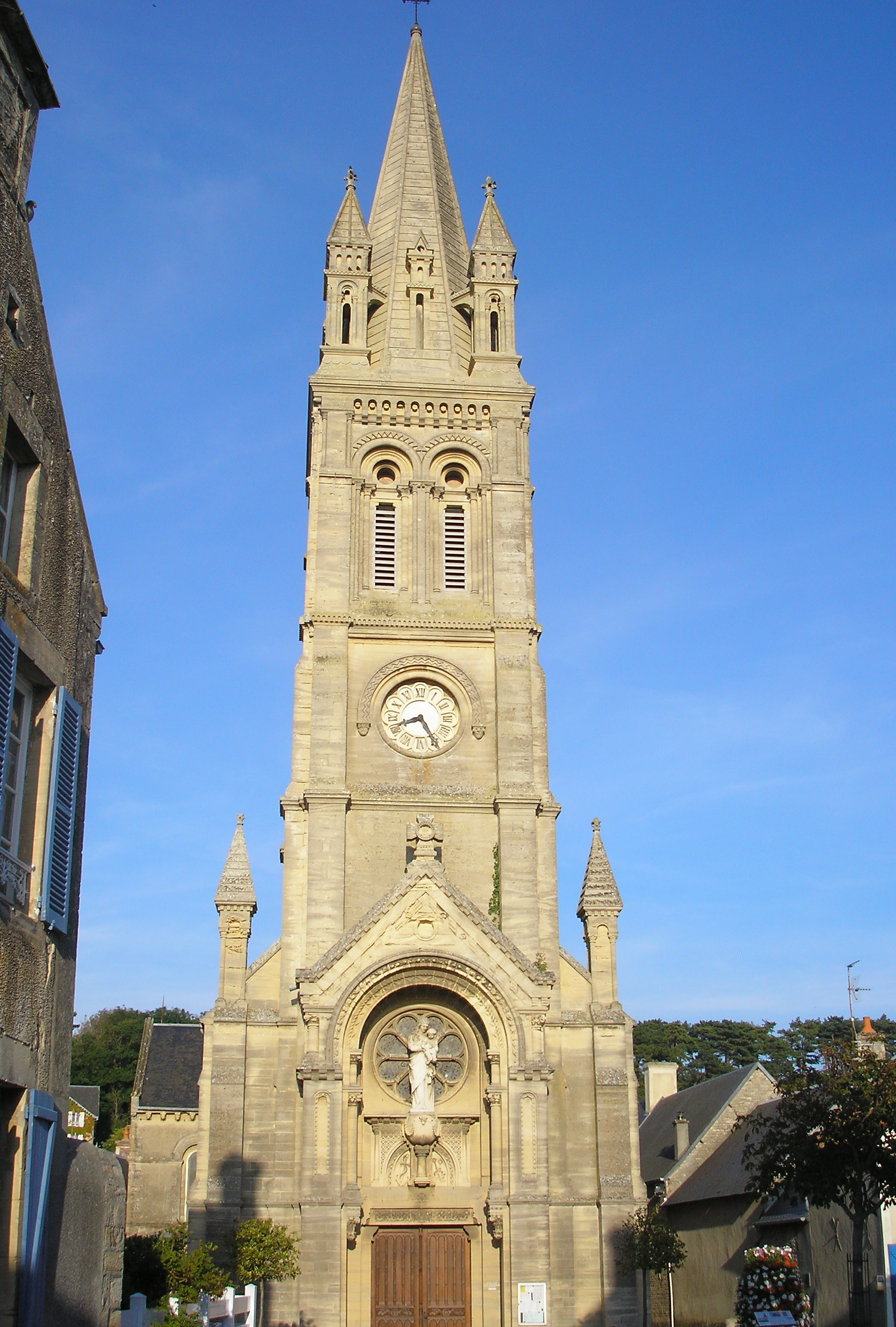 Arromanches-les-Bains (Normandie, France). L'église Saint-Pierre.